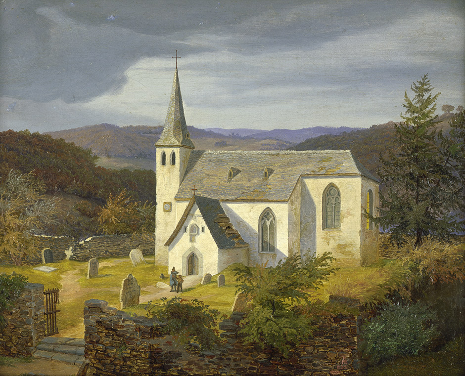 Gotische Kirche (in der Nähe von Happels Geburtsort Arnsberg im Sauerland?). Öl auf Leinwand. 26 x 32 cm. Am Unterrand monogrammiert und datiert "PHH (ligiert) 1832".